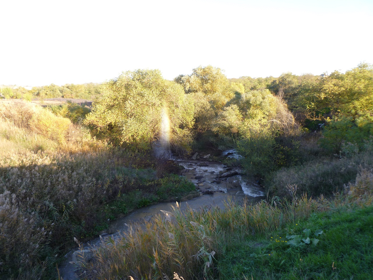 река Мутнянка у Надежды